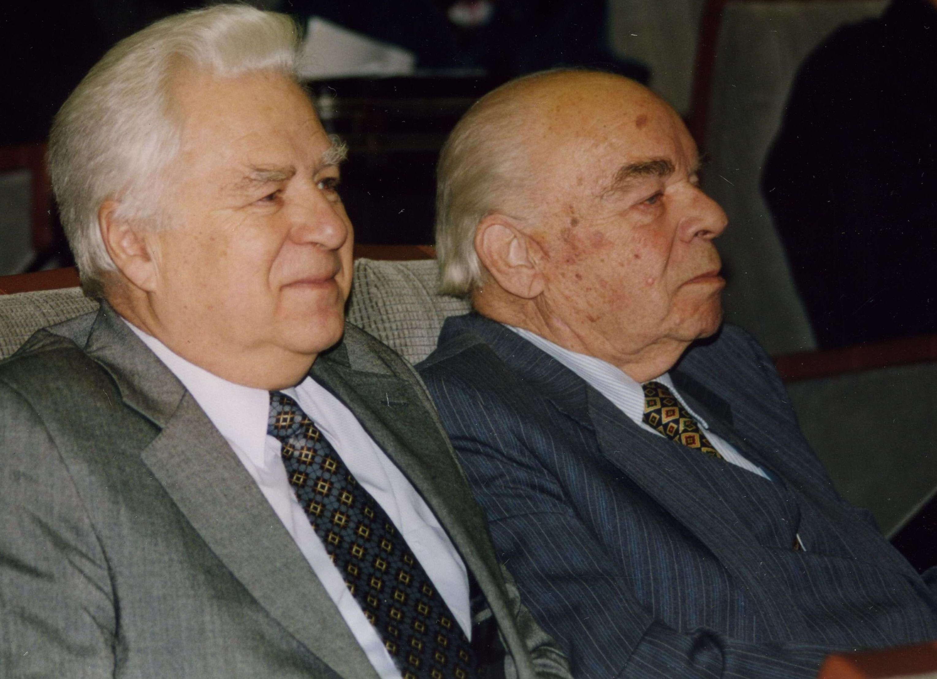 фото Ливчака И.Ф. и его с сыном на съезде АВОК в 2004г